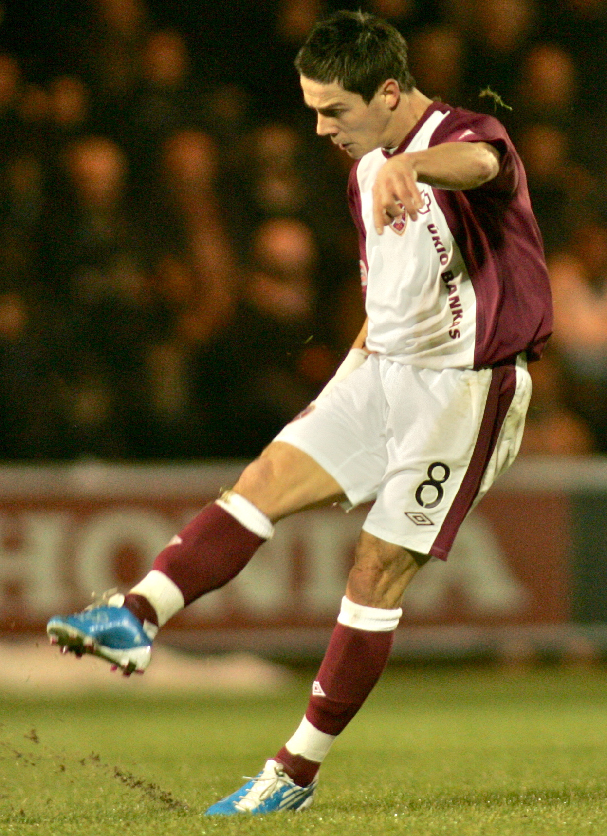 Ian Black, St Mirren vs Hearts